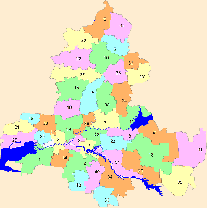 Изображение Адм.карты Ростовской области